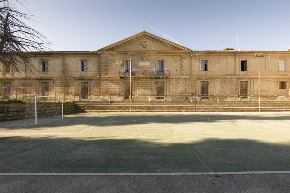 Facciata dell'edificio dell'ex IPSIA De Giorgio ed ex Palestra Comunale.